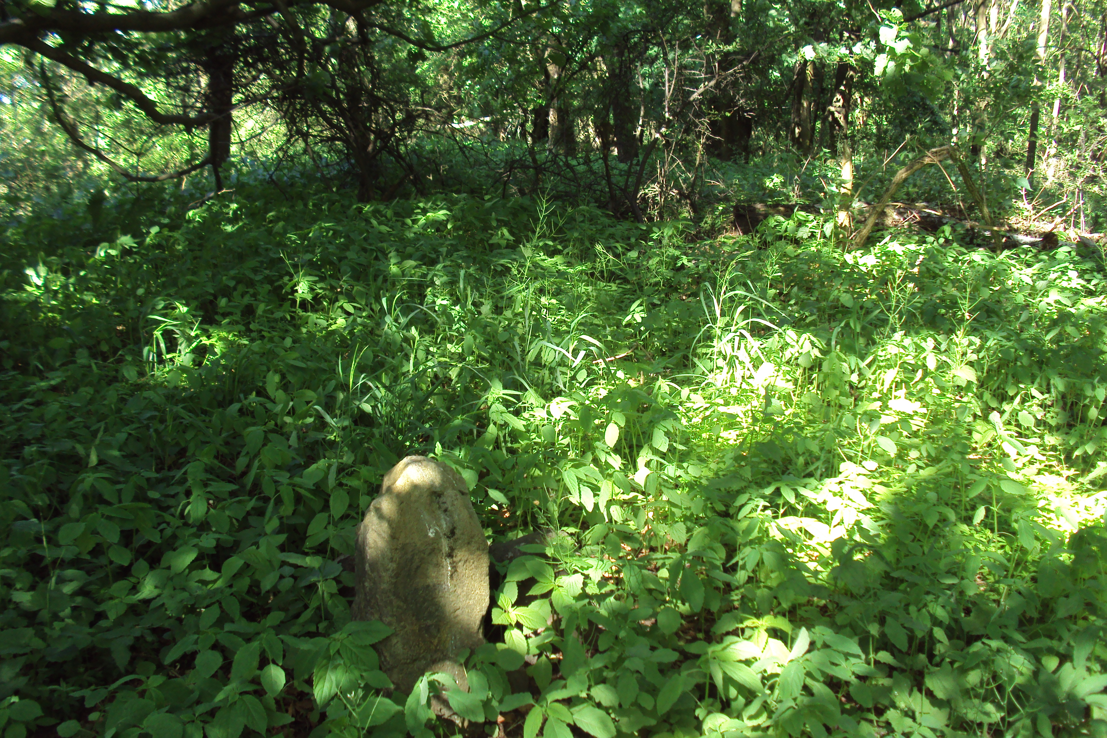 Vrchol kopce Kozel 597 m, České Středohoří, část Verneřické středohoří, okraj okresu Česká Lípa, součást Kozelského hřebenu. Zarostlý, bez výhledu